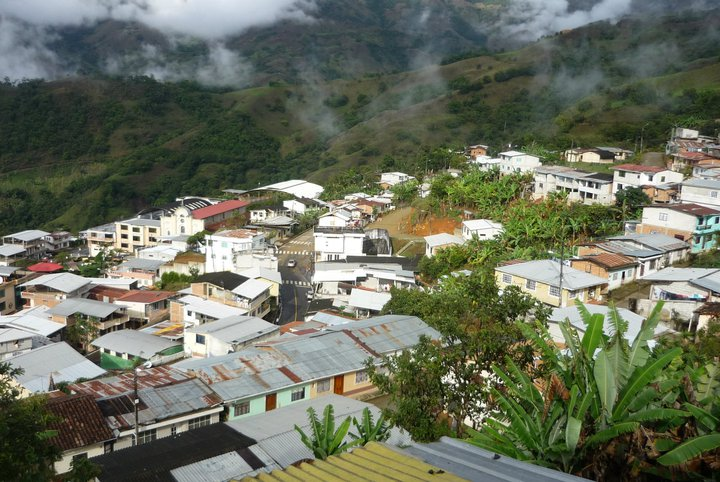 Sector Centro Norte de la Ciudad